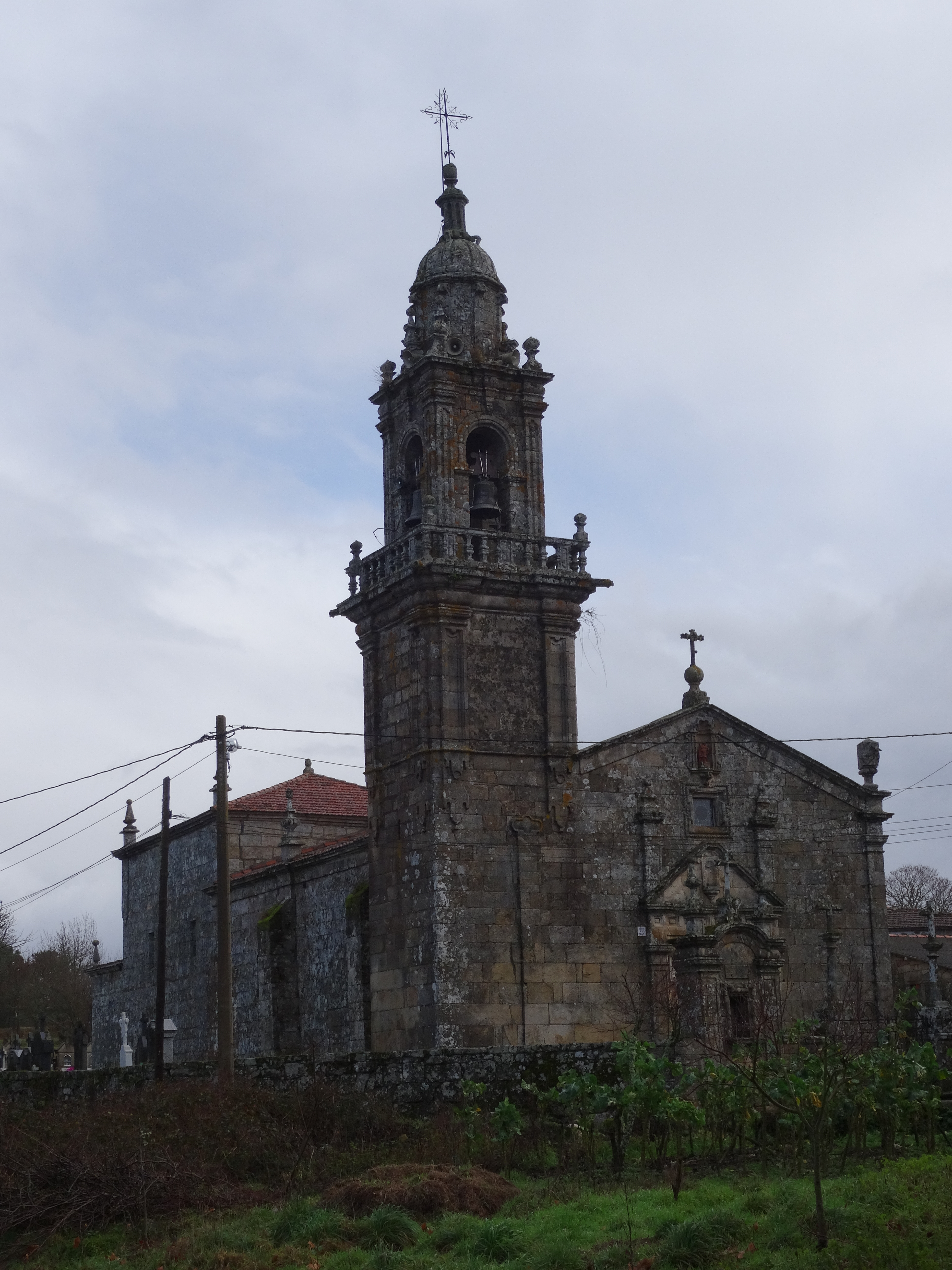 Ver título.